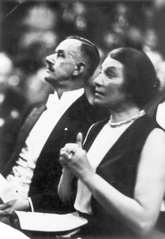 ADN ZB Deutschland: Paneuropa-Kundgebung in der Berliner Singakademie Teilnehmer sind u.a. der Schriftsteller Thomas Mann und Frau Ida Roland-Coudenhove-Kalergi. 17173-30 (Aufnahme: 1930)